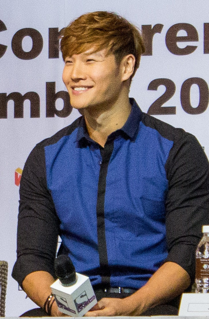 Kim Jong Kook at Malaysia for Running Man Fan Meeting Asian Tour 2014